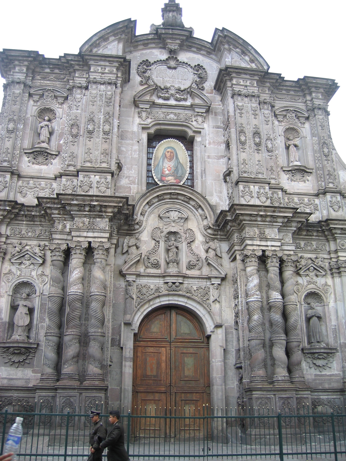 Iglesia de la Compañía de Jesús (1535~1630), Quito, Ecuador.